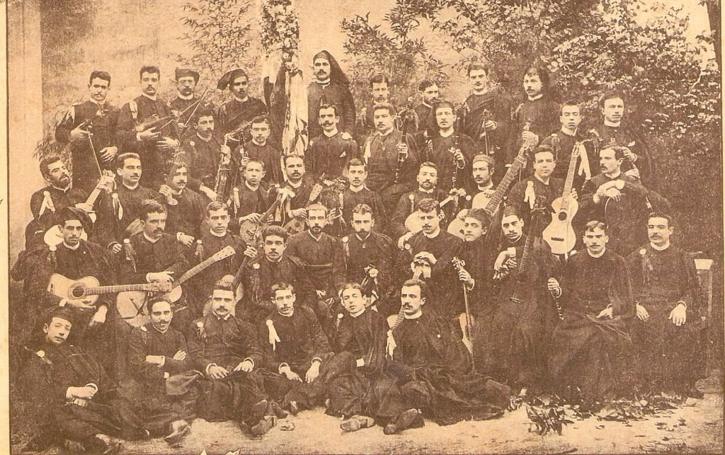 Foto da Estudantina de Coimbra, criada em Maio de 1888 e extinta em 1890.